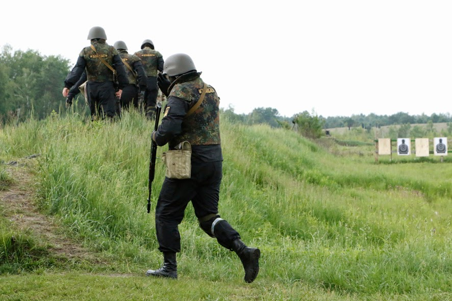 Відкрите тренування добровольців батальйону Донбас на тренувальній базі Нацгвардії України під Києвом.